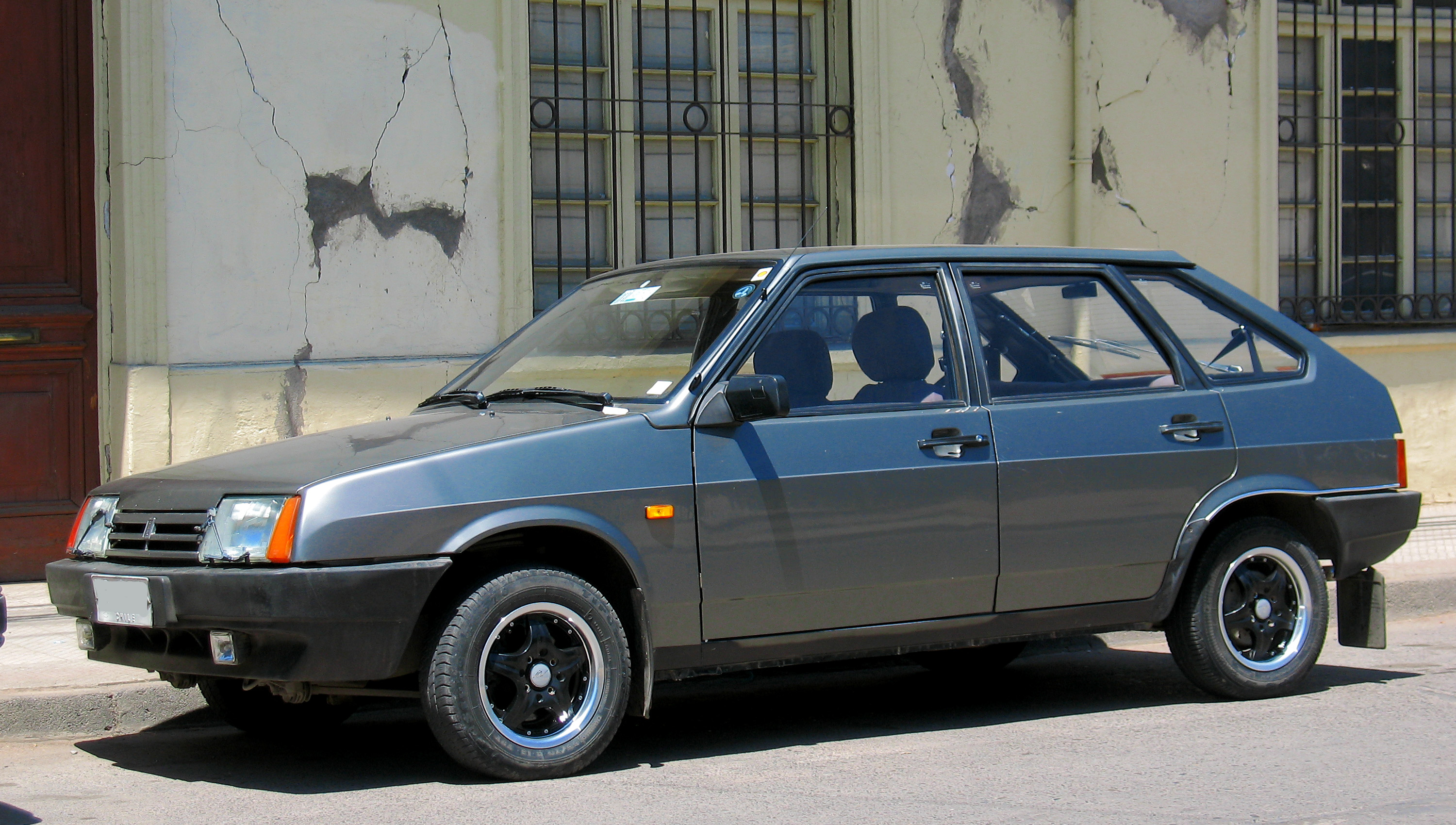 Lada Samara 1300 1995